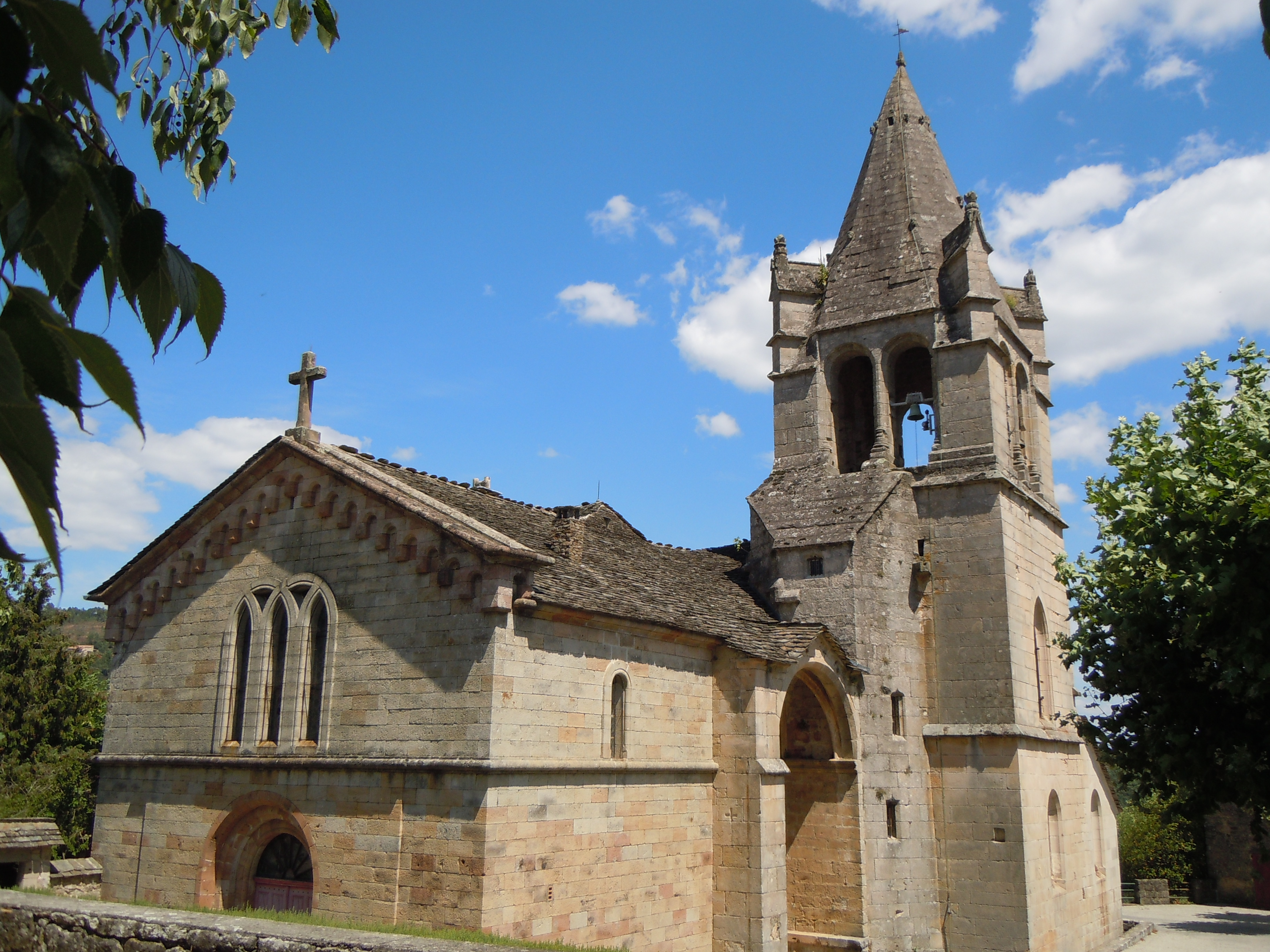 Église Saint-Victor de Gravières - Ardèche